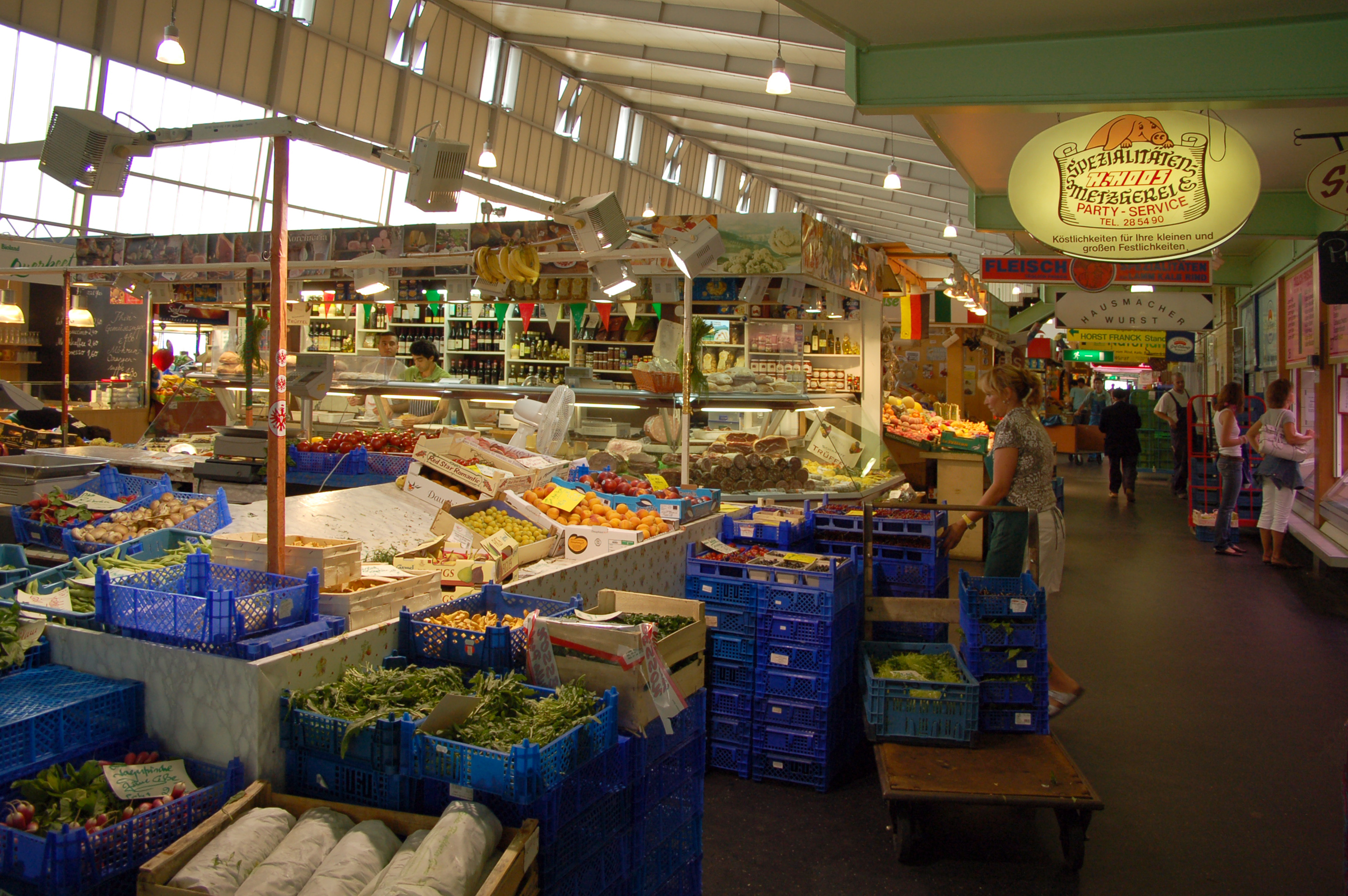 Blick in die Kleinmarkthalle Frankfurt vom Westeingang